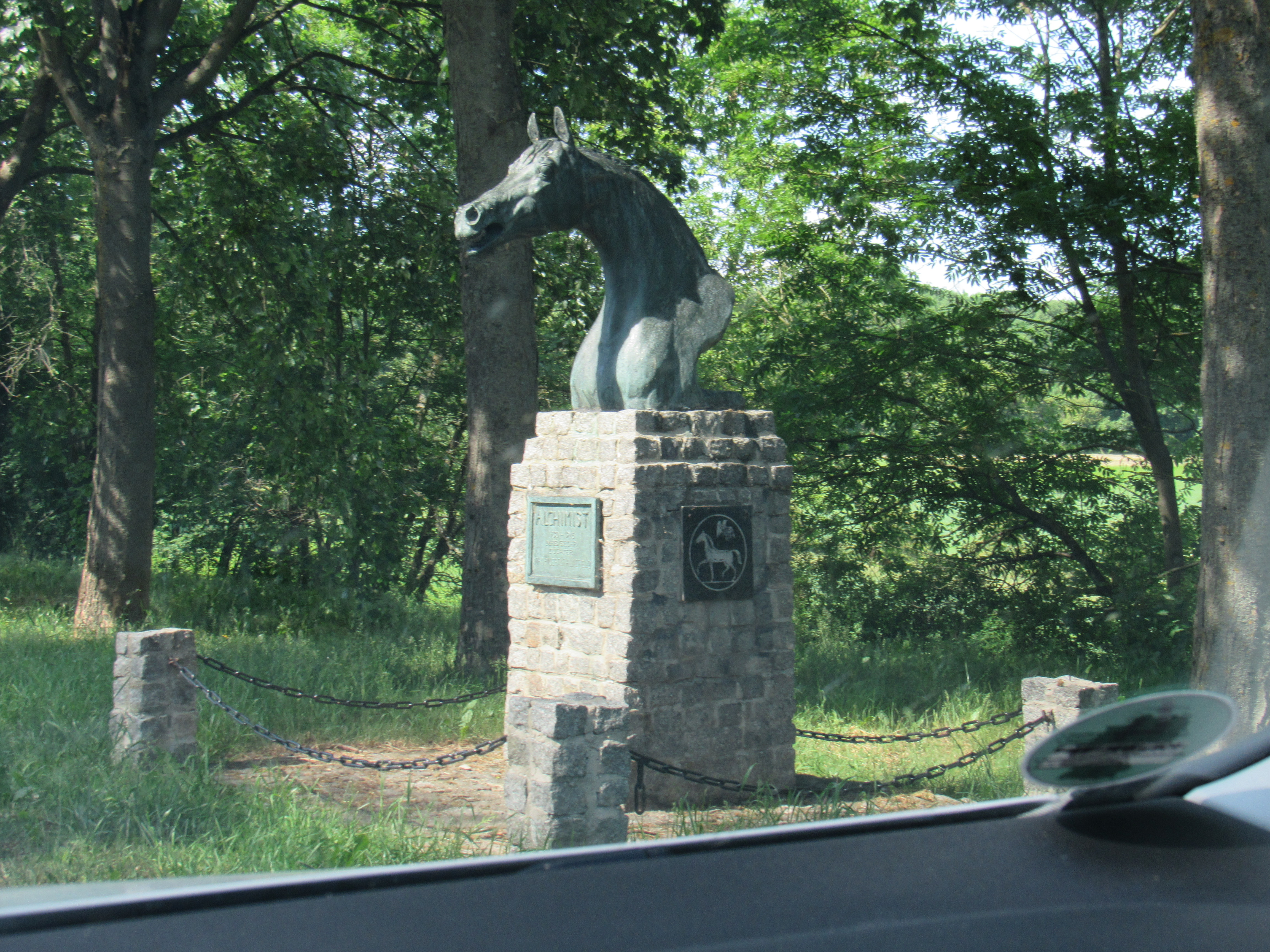 Altefeld, Alchimist